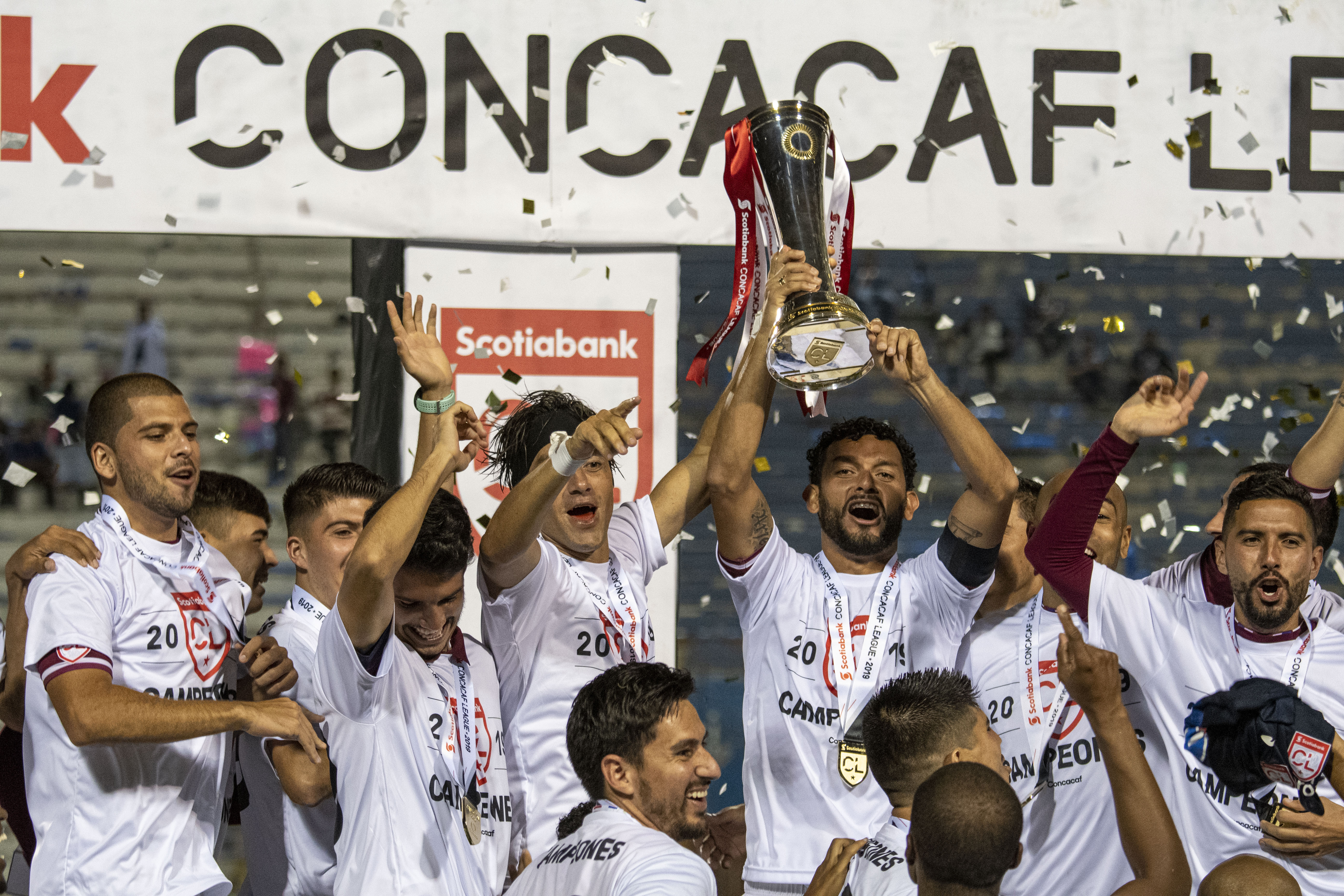 El Deportivo Saprissa festeja su trofeo de campeón de Liga Concacaf tras empatar 0-0 ante el Motagua en el Estadio Nacional de Tegucigalpa. En la fotografía Michael Barrantes y Christian Bolaños alzan el trofeo.